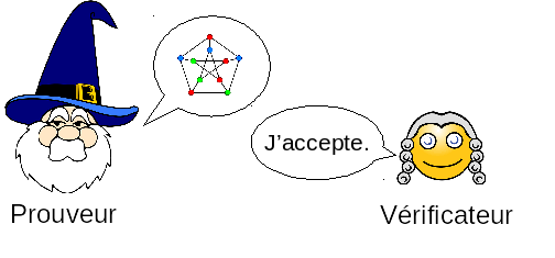 Système interactif preuve